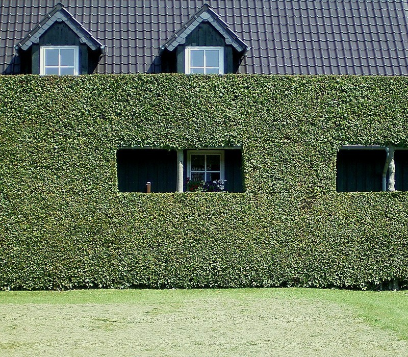 Monschauer Heckenland